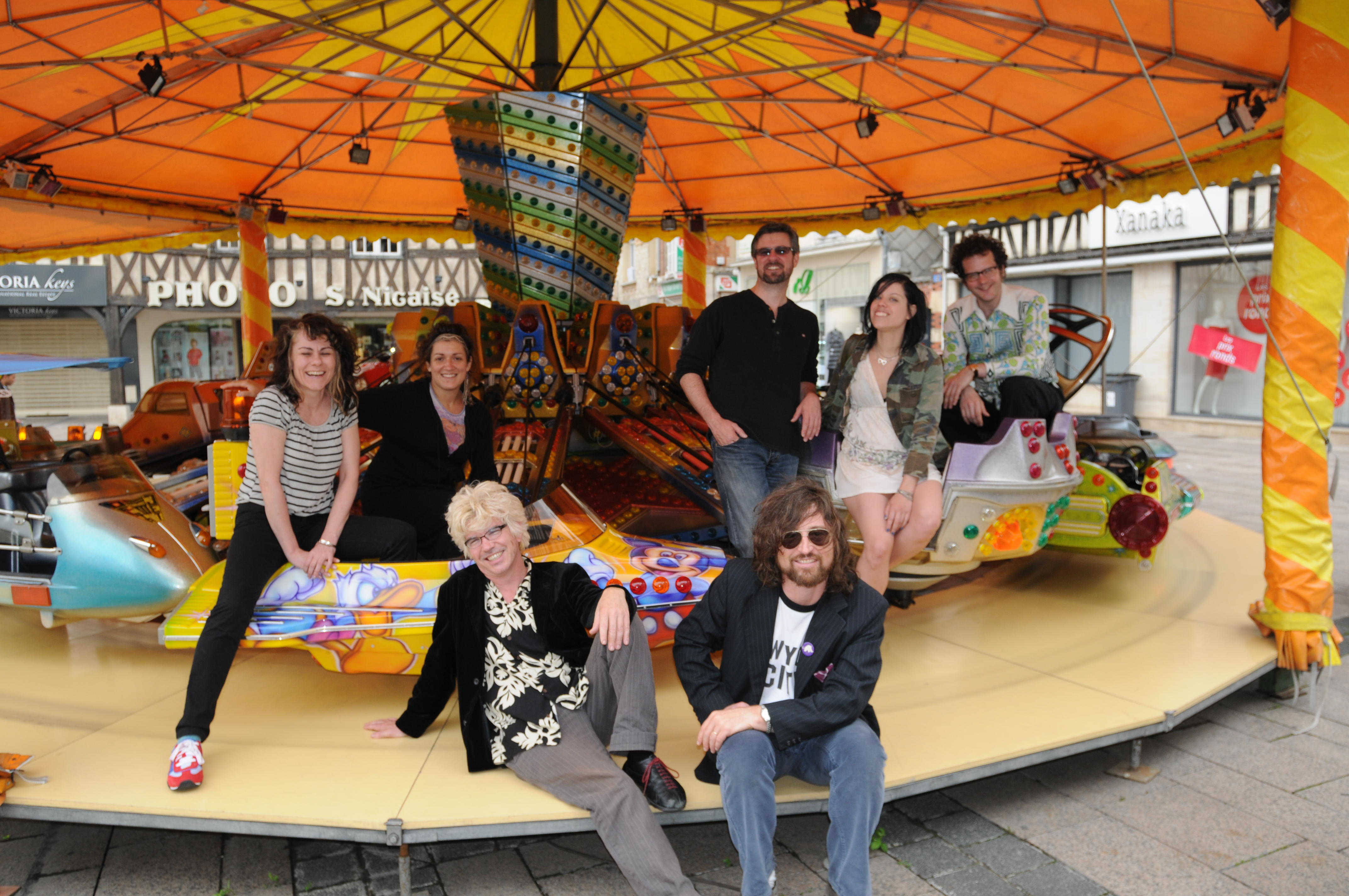 Les Sans Culottes in Châlons-en-Champagne, France August 2009. Left to right: Kit Kat Le Noir, Edith Pissoff, Johnny Dieppe, Clermont Ferrand, Jacques Strappe, Jeanaté, Theo Neugent